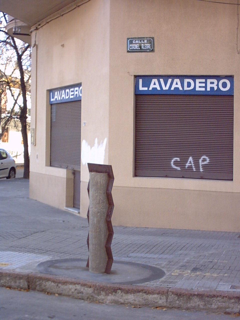 Esquina de calle Coronel Alegre en Montevideo, con el recuerdo del lugar donde estaba el centro de la cancha del Estadio de Pocitos